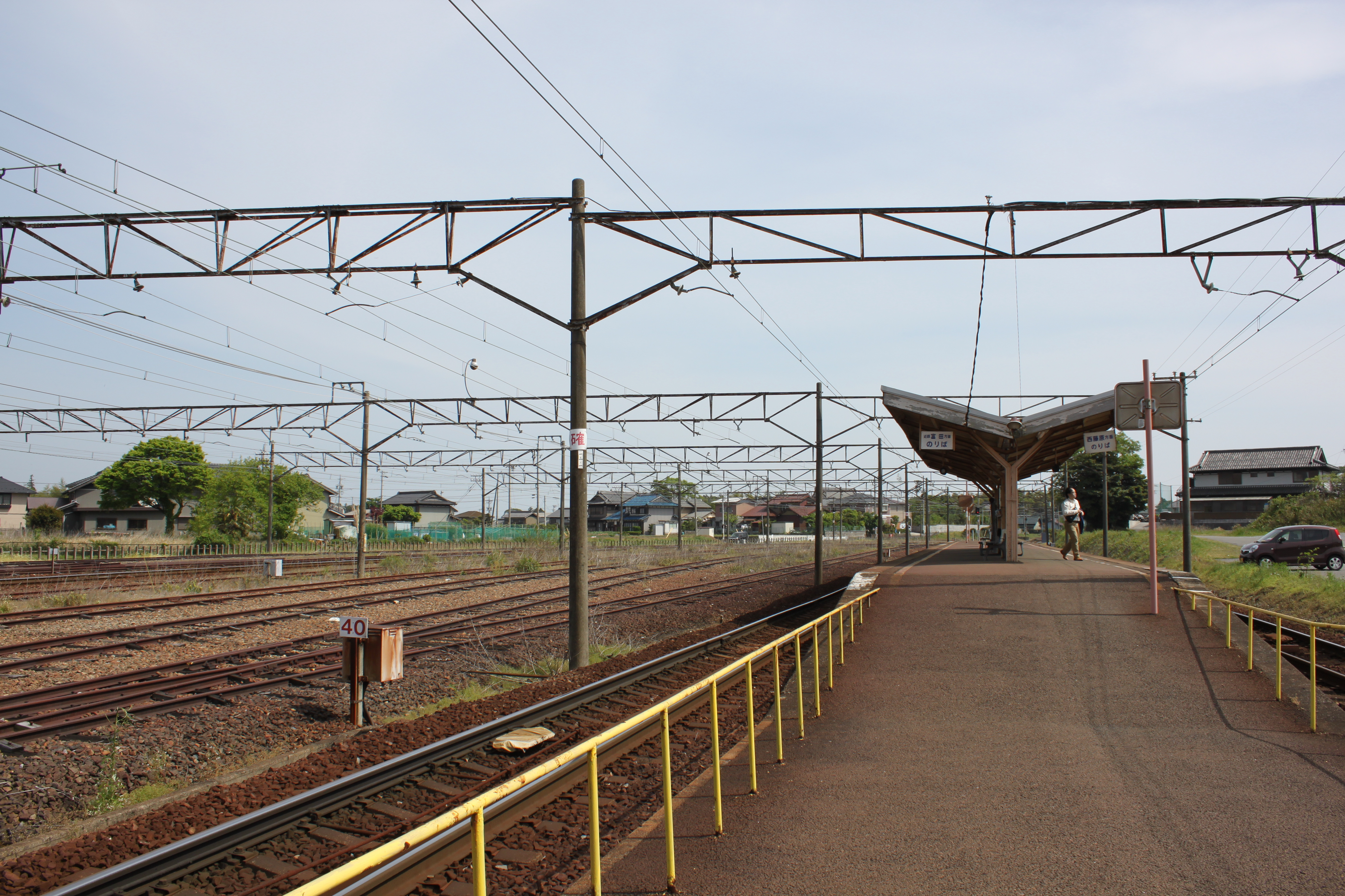 三岐鉄道三岐線伊勢治田駅構内